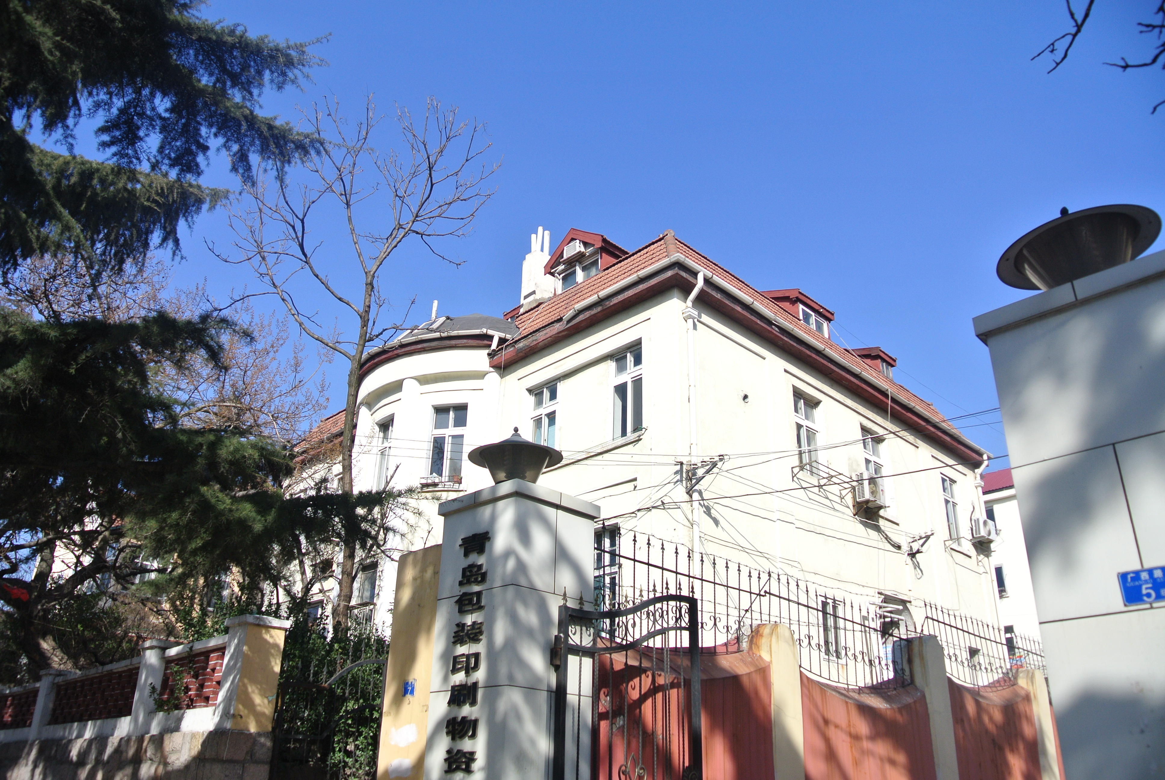 青岛广西路7号祥福洋行住宅